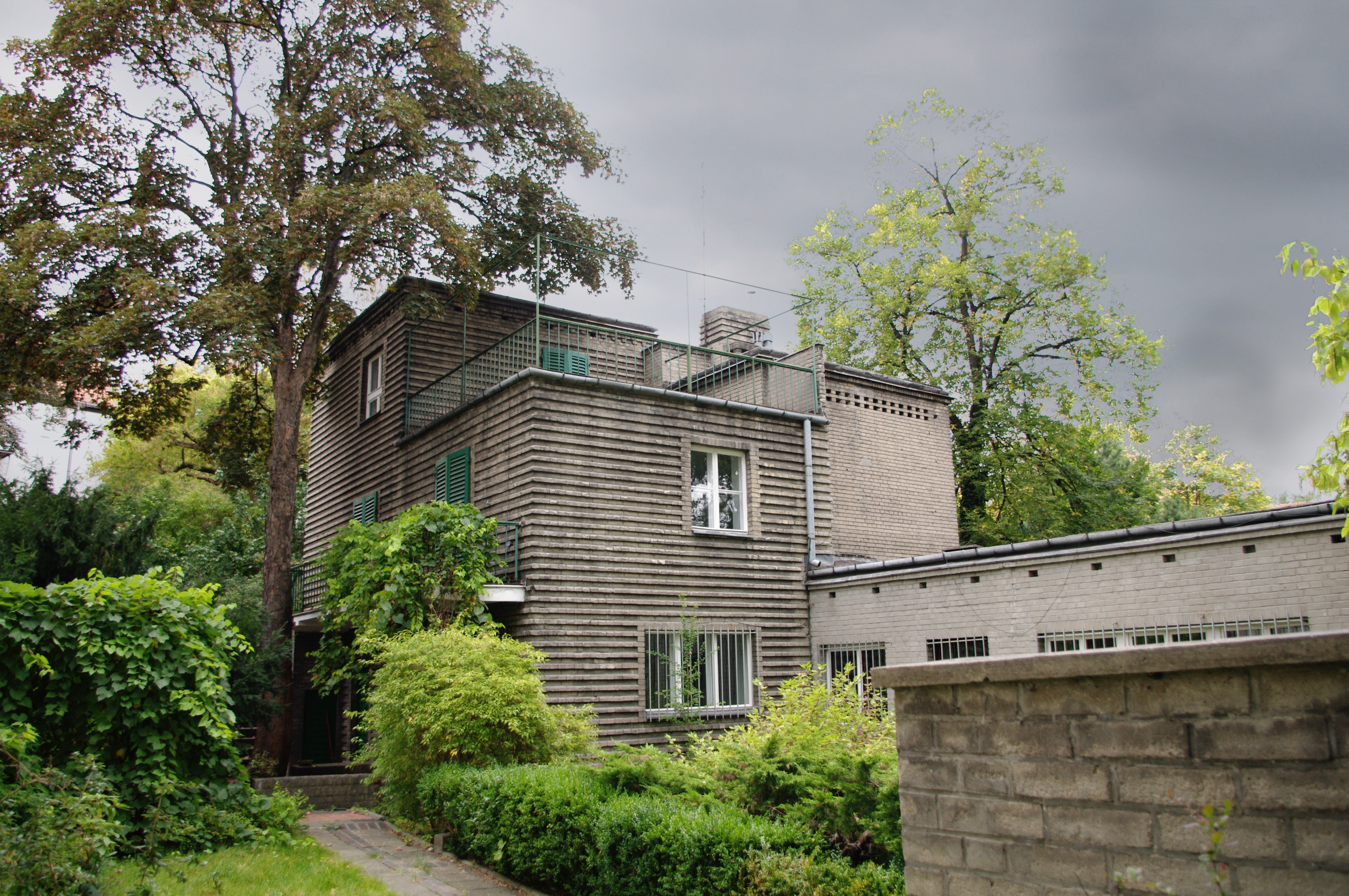 dom z 1925 roku, przy ul. Hoene-Wrońskiego 5 w Warszawie (zabytek nr rejestr. 920)